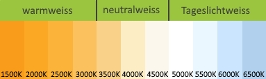 Farbverlauf der Farbtemperatur von LED-Leuchtmittel die in Kelvin (K) angegeben wird